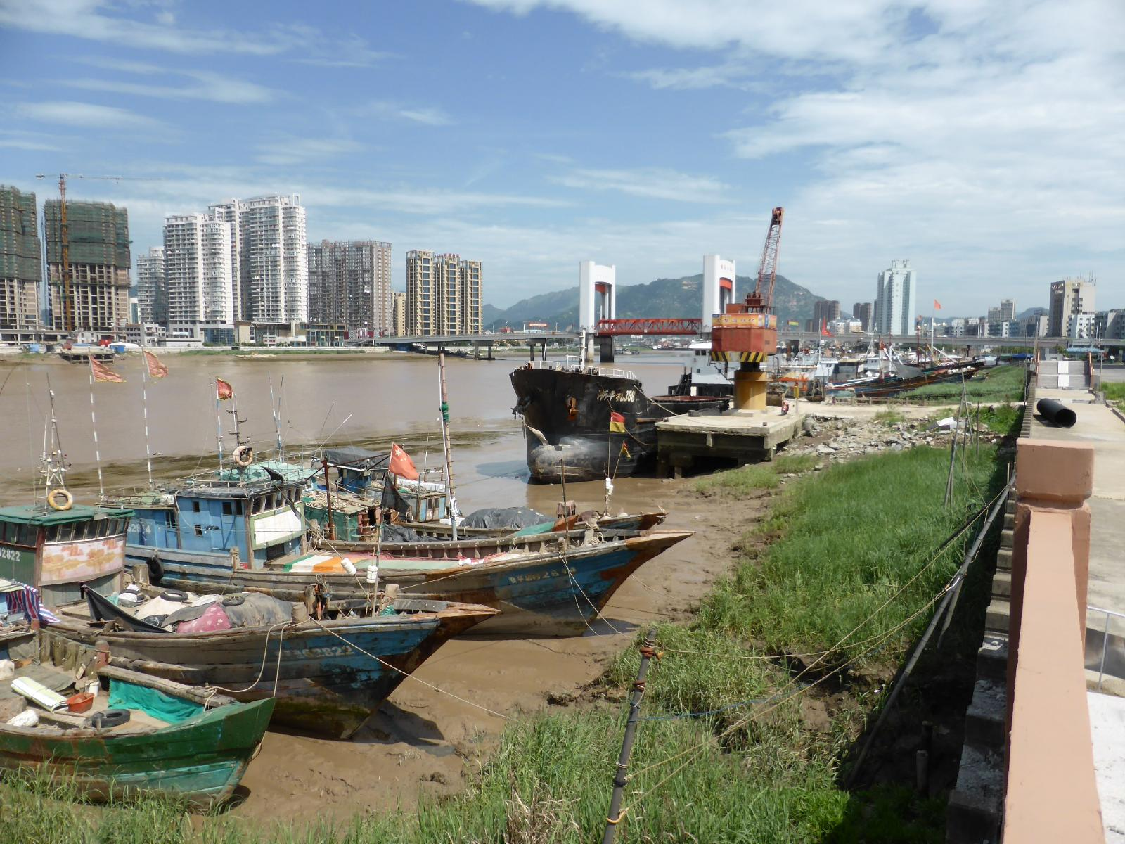 欧南大橋。手前が平陽県、対岸が蒼南県。